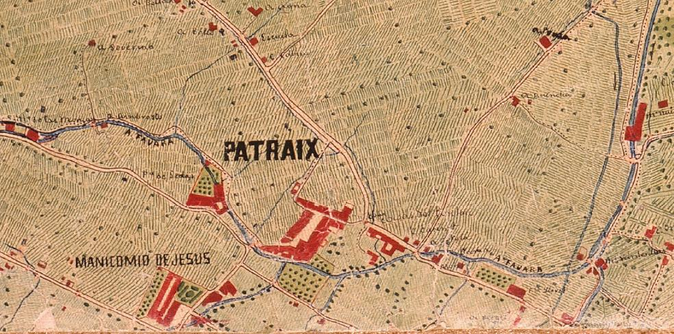 Patraix el 1883 (el nord està a la dreta).